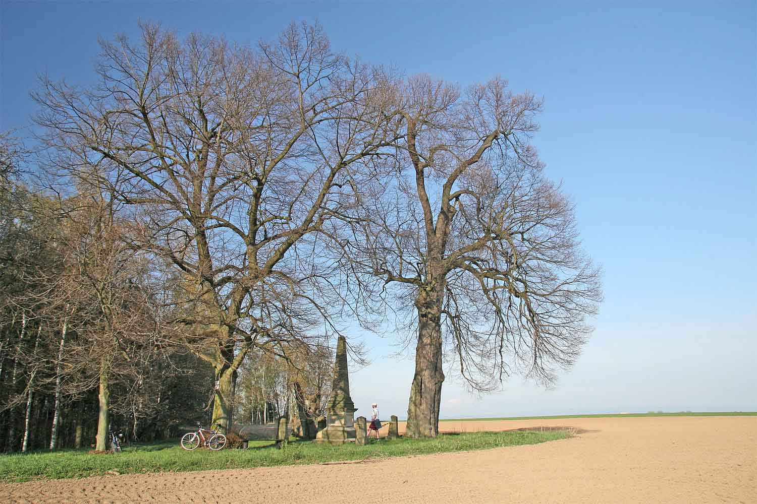 Památné Hořiněveské lípy